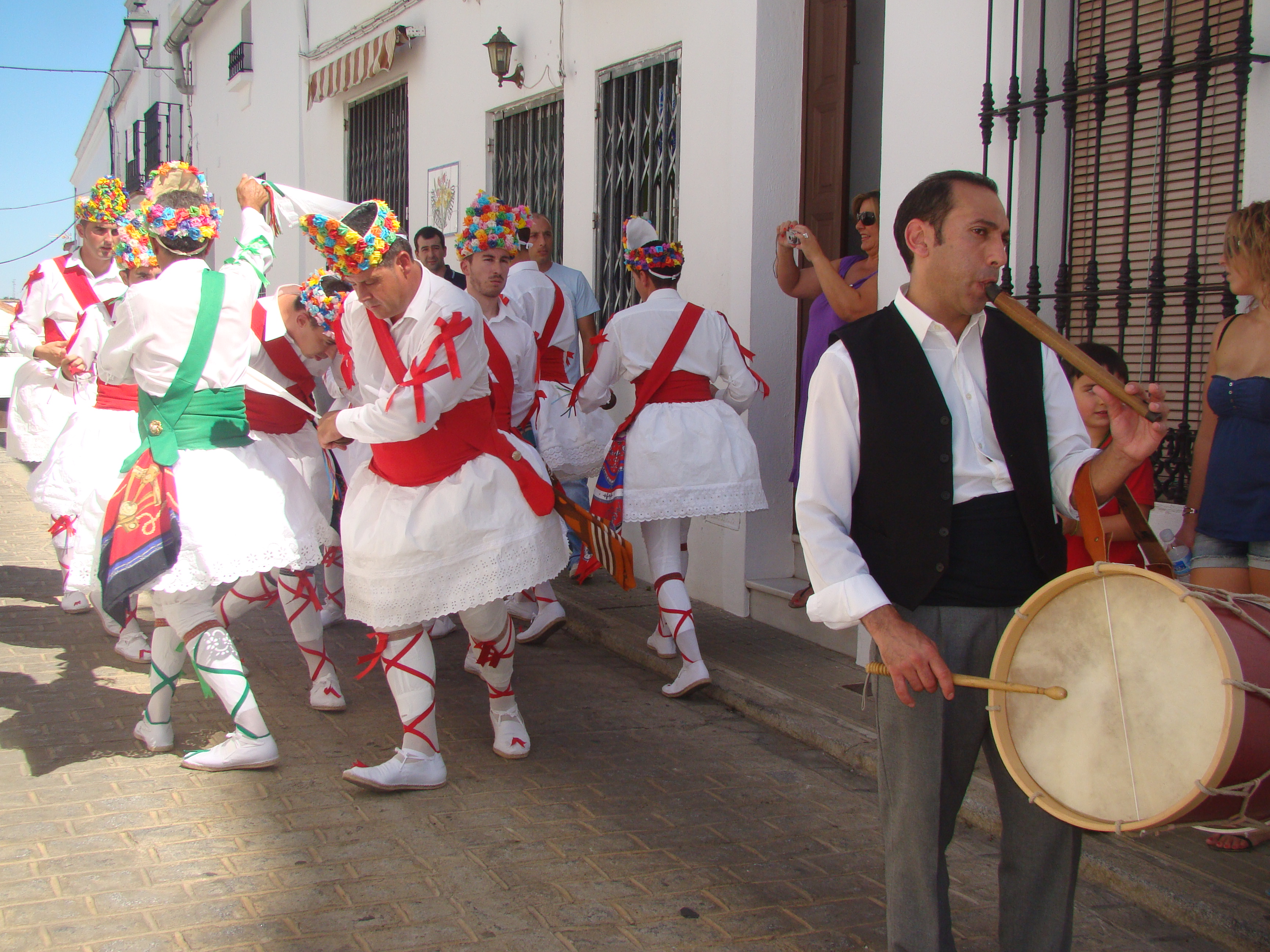 danzaores